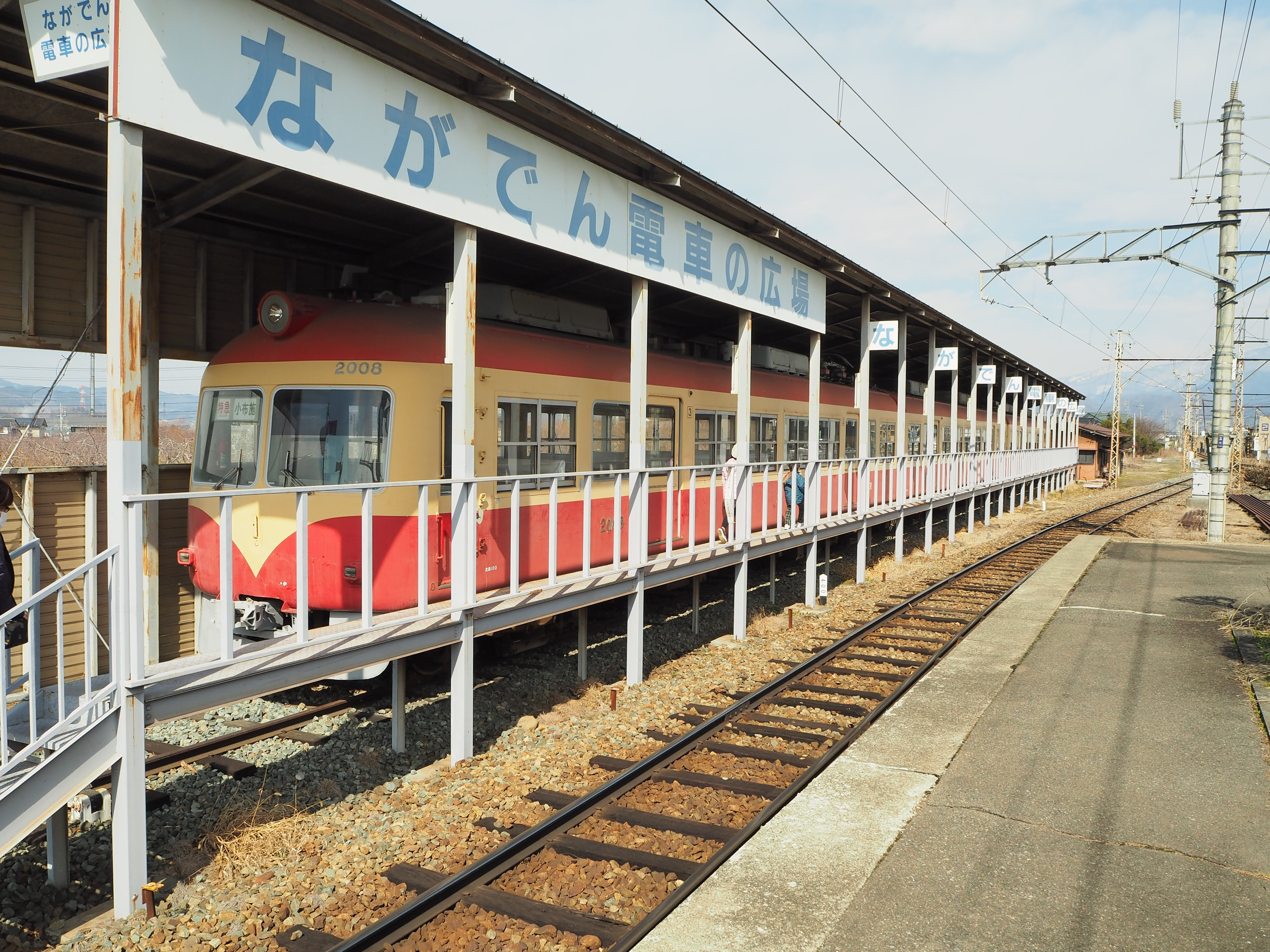 長野電鉄で活躍した2000系D編成。小布施駅にて保存されている。